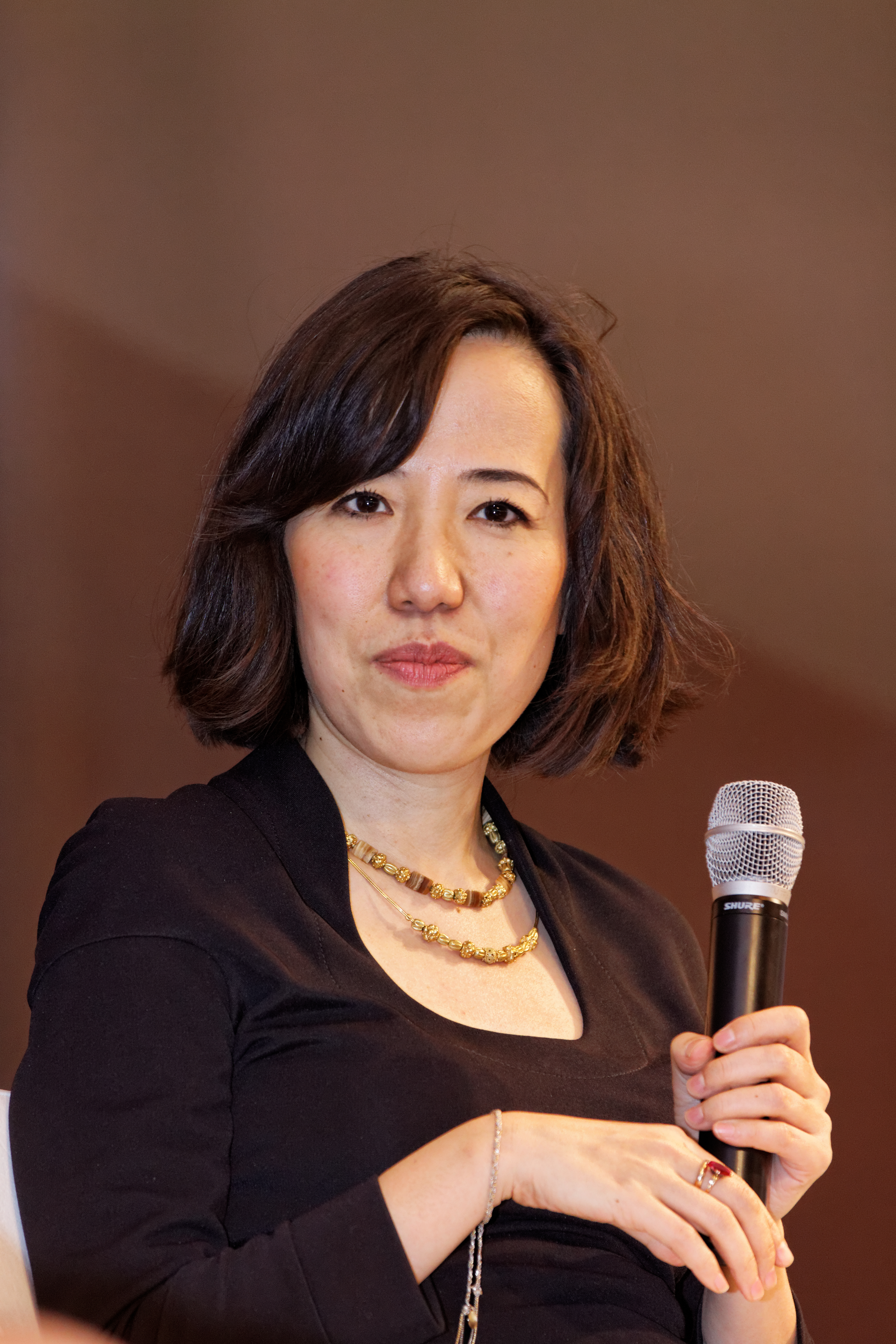 Ryoko Sekiguchi en conférence au salon du livre de Paris 2012.